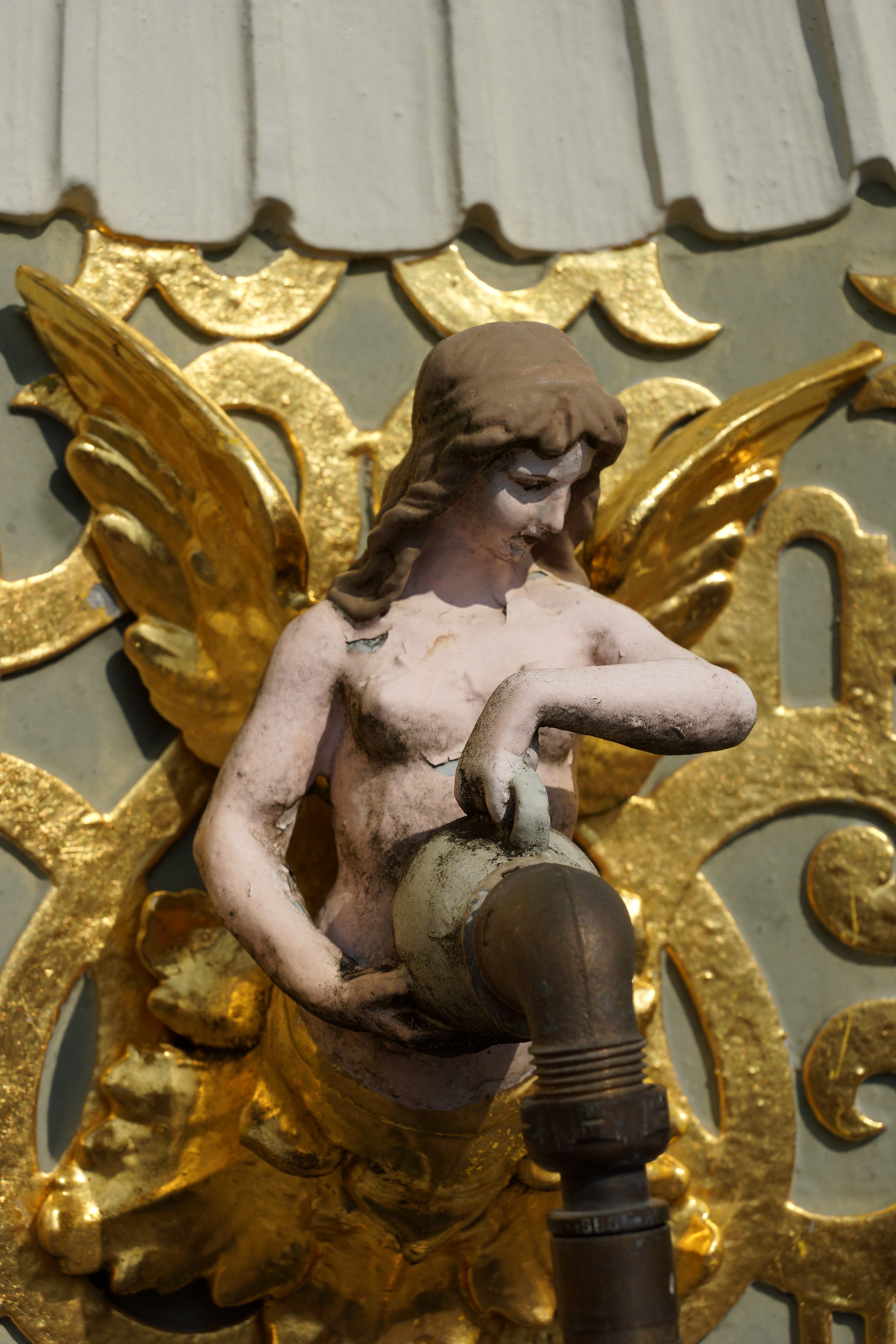 Kriegerdenkmal - St. Laurerentius / St. Laurenzius / St. Lorenz - Brunnen in Sindlbach / Gemeinde Berg - Oberpfalz